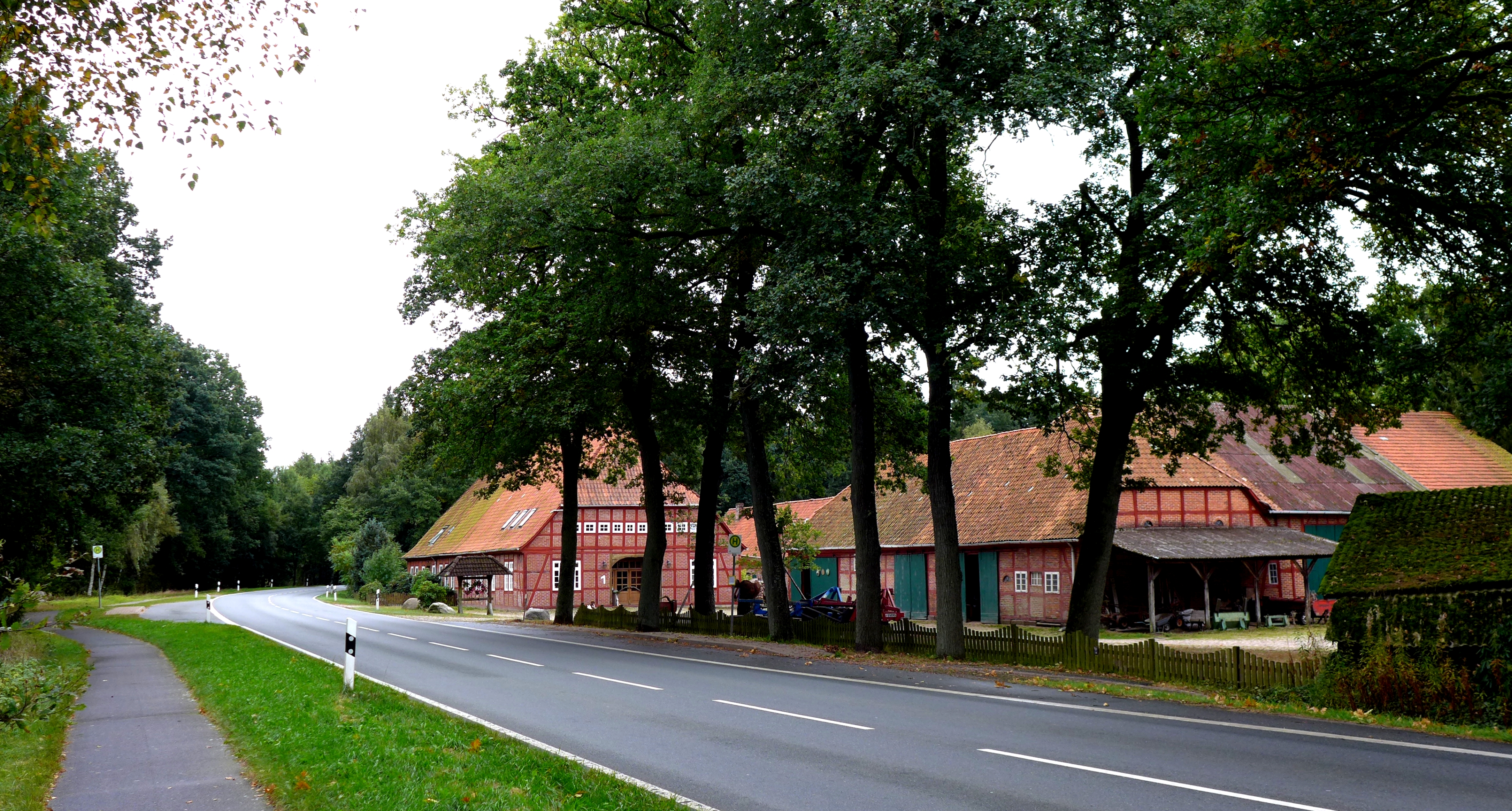 Bauernhof in Leverdingen, einem Ortsteil von Neuenkirchen im Landkreis Heidekreis. Aufnahmedatum 2016-10.